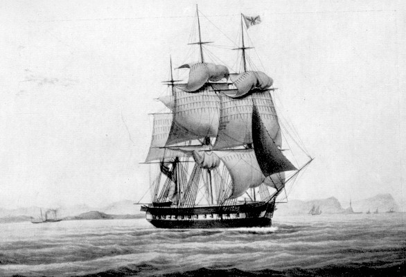 La fregata a vela Euridice durante il suo viaggio in Sudamerica